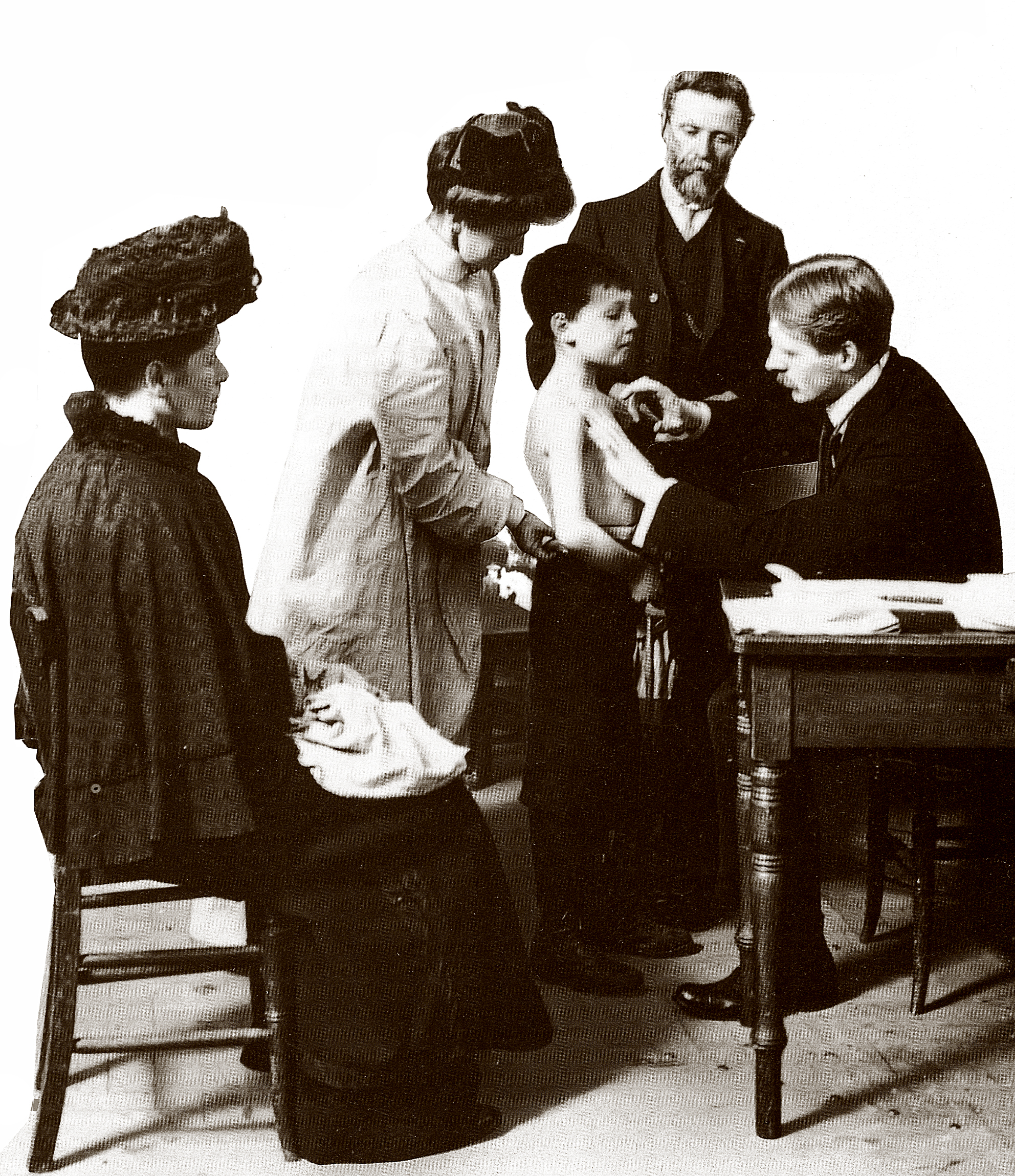 Врачебный осмотр.